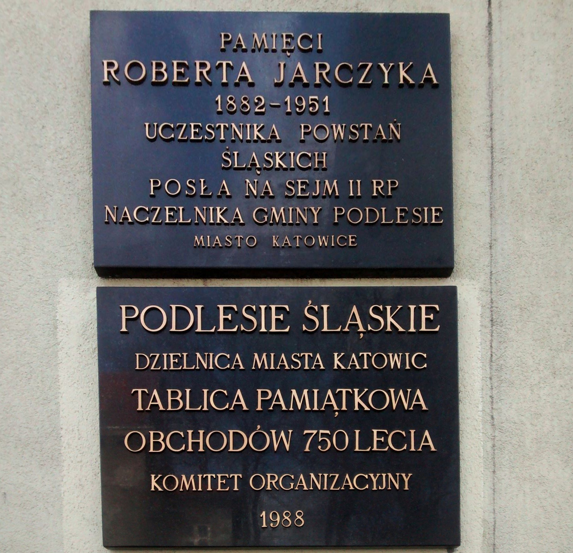 Podlesie - tablice pamiątkowe na budynku przy ul. Uniczowskiej 36